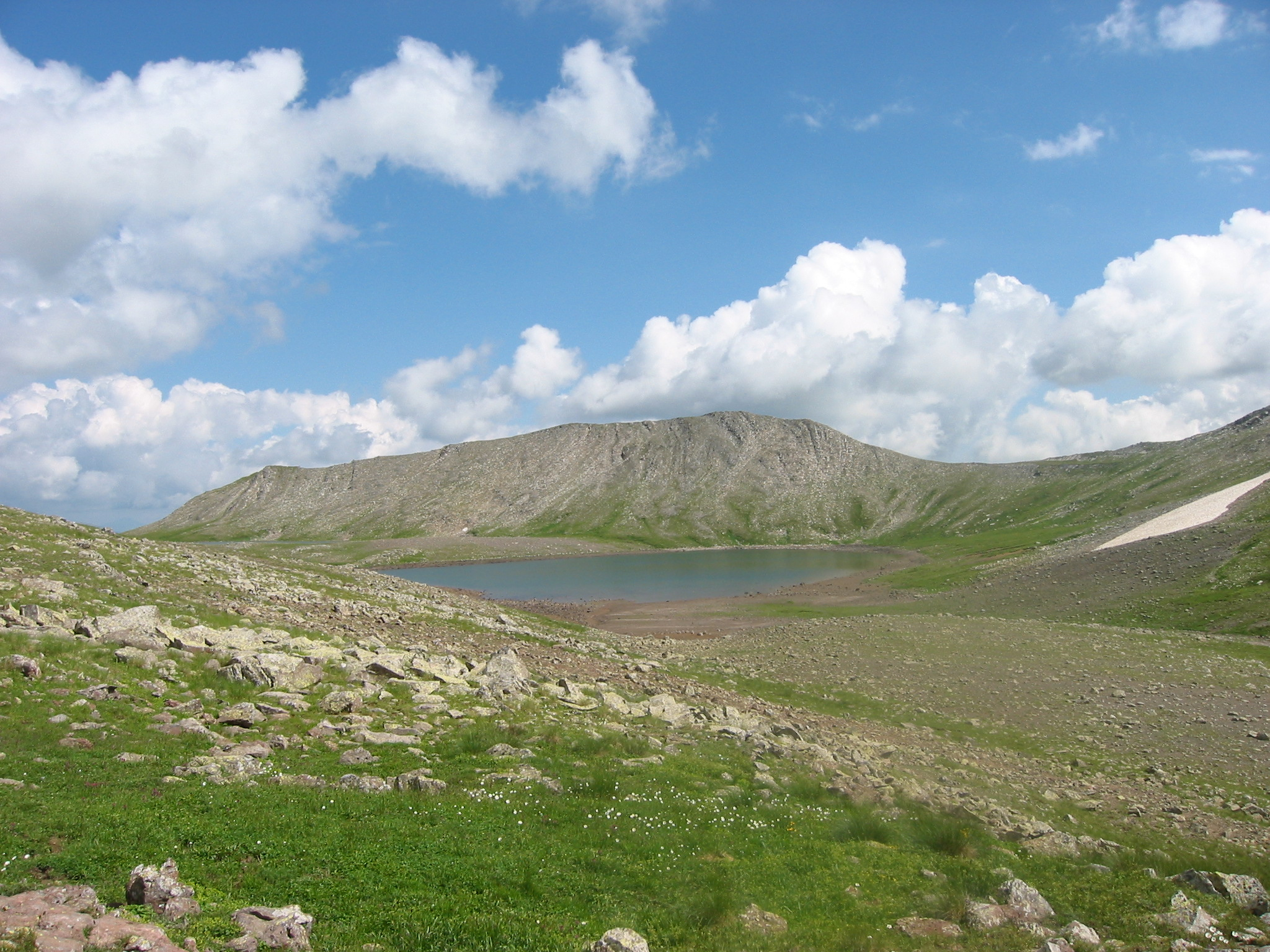 Keli Lake 09.08.2005